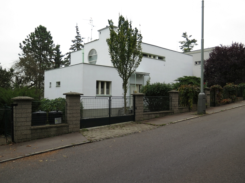 Vila Barrandovská 11, Barrandovská 161/11, Barrandov.